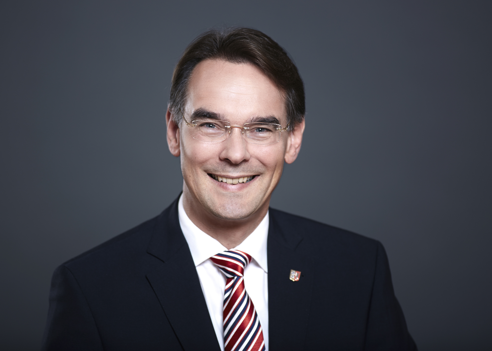 Ingbert Liebing MdB